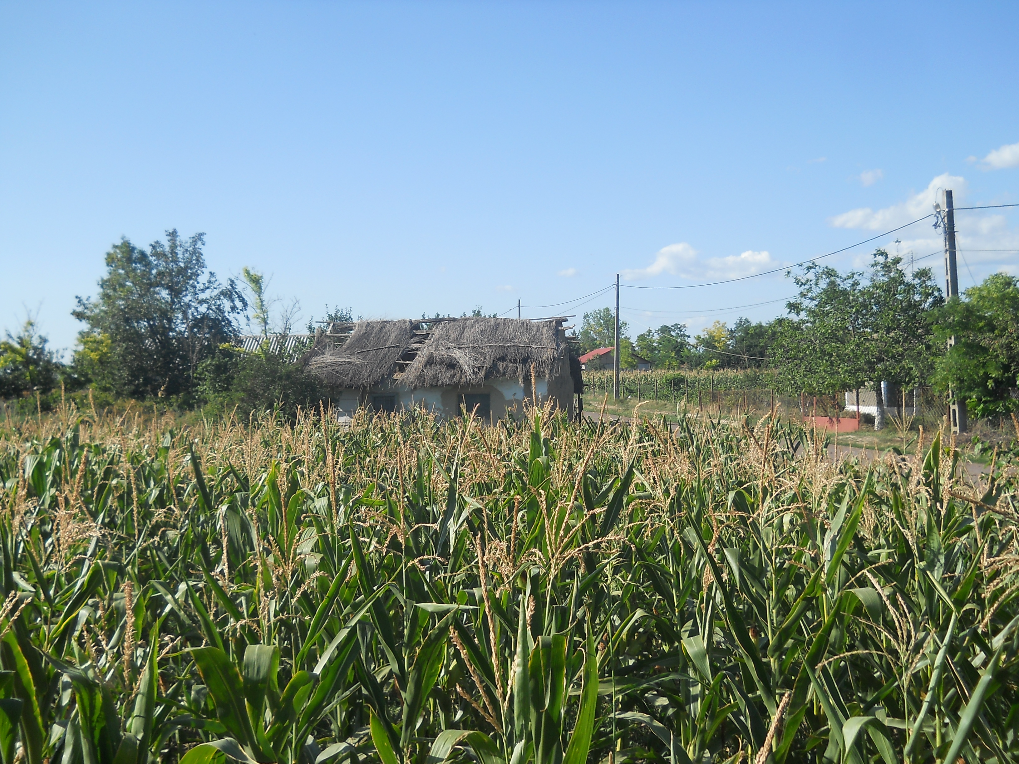 Imagine surprinsă în satul Sinoe.